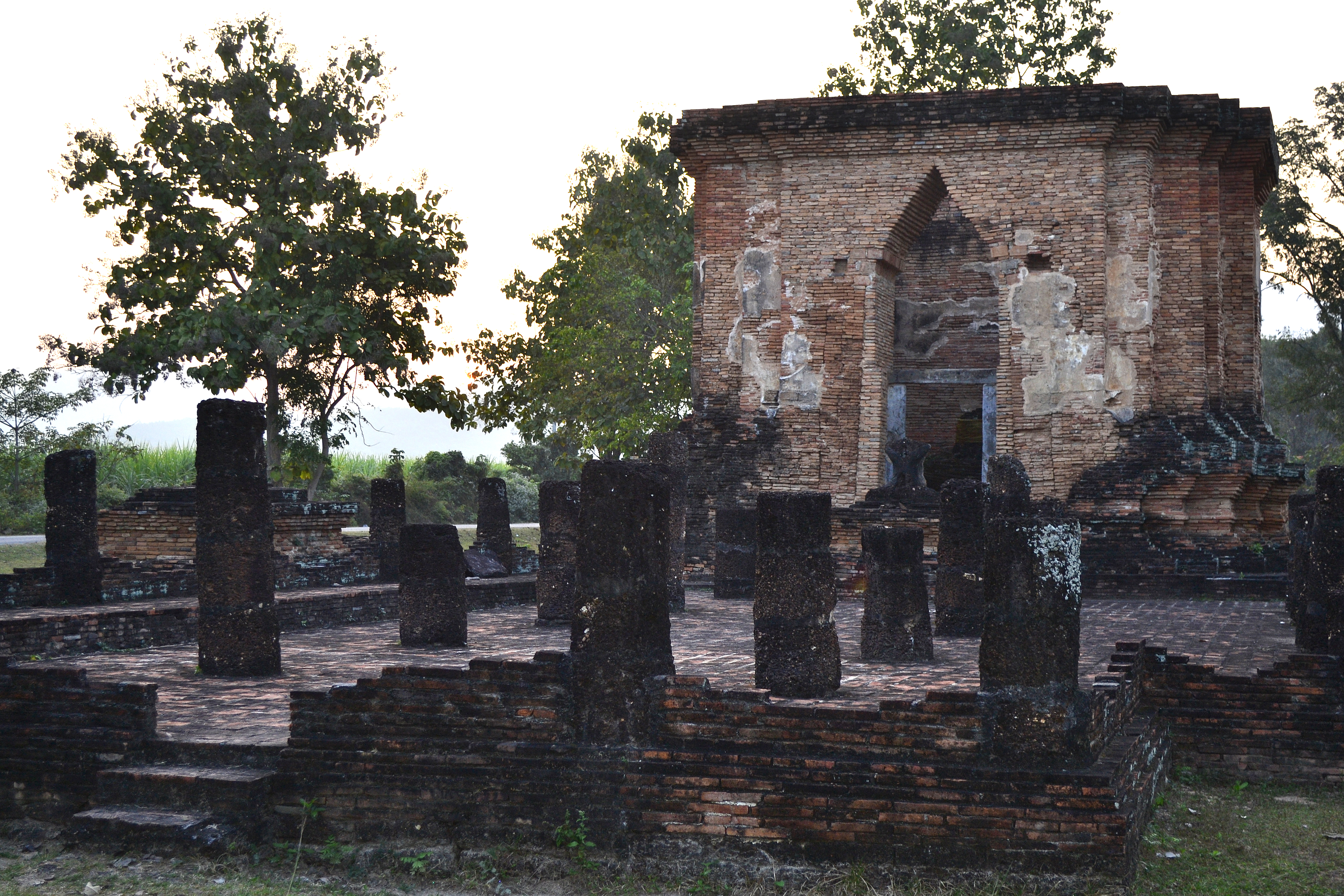 Wat Thuek im Geschichtspark Sukhothai